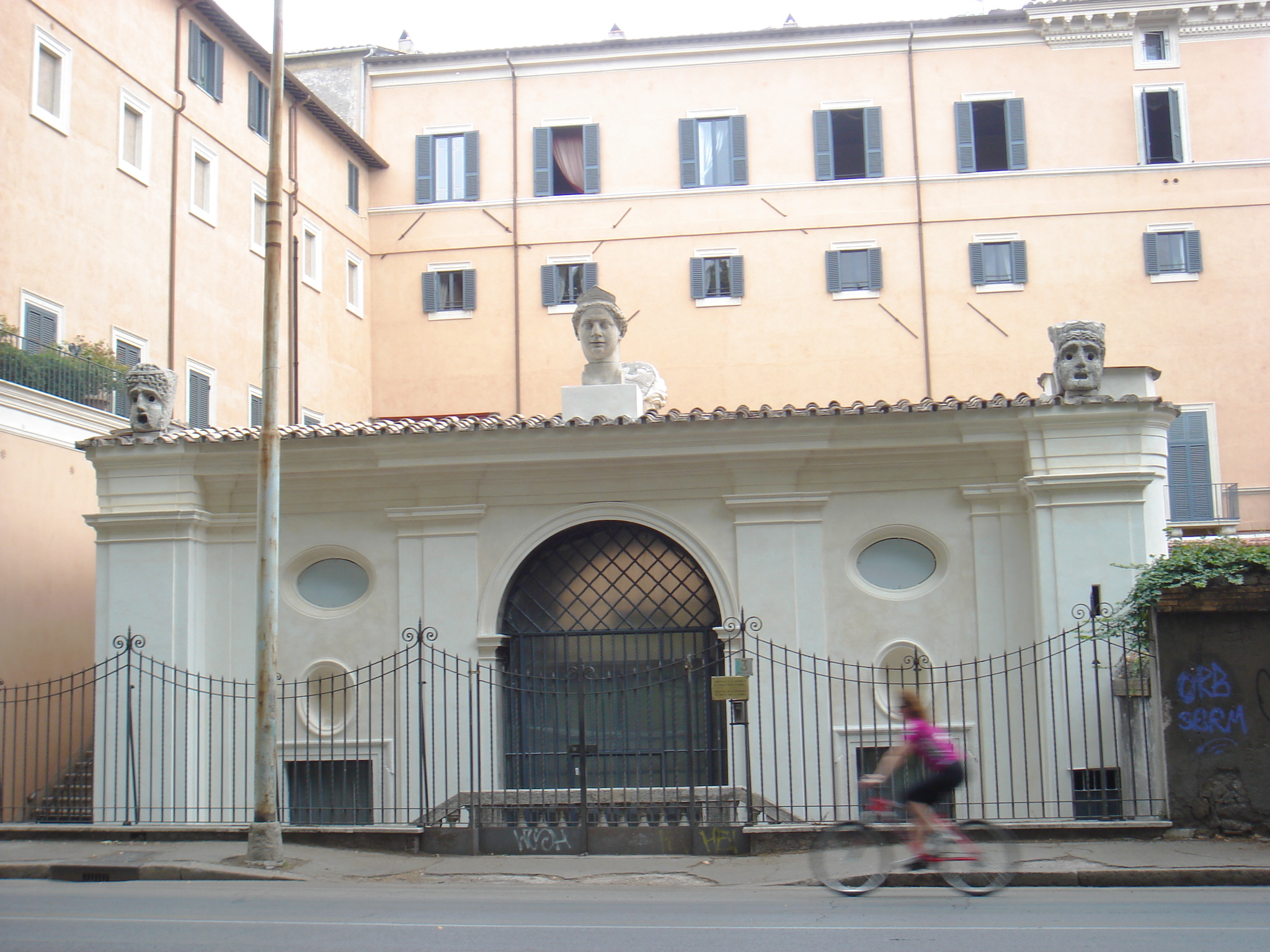 Roma, palazzo Sacchetti - facciata e giardino verso il Tevere (oggi su Lungotevere dei Sangallo)